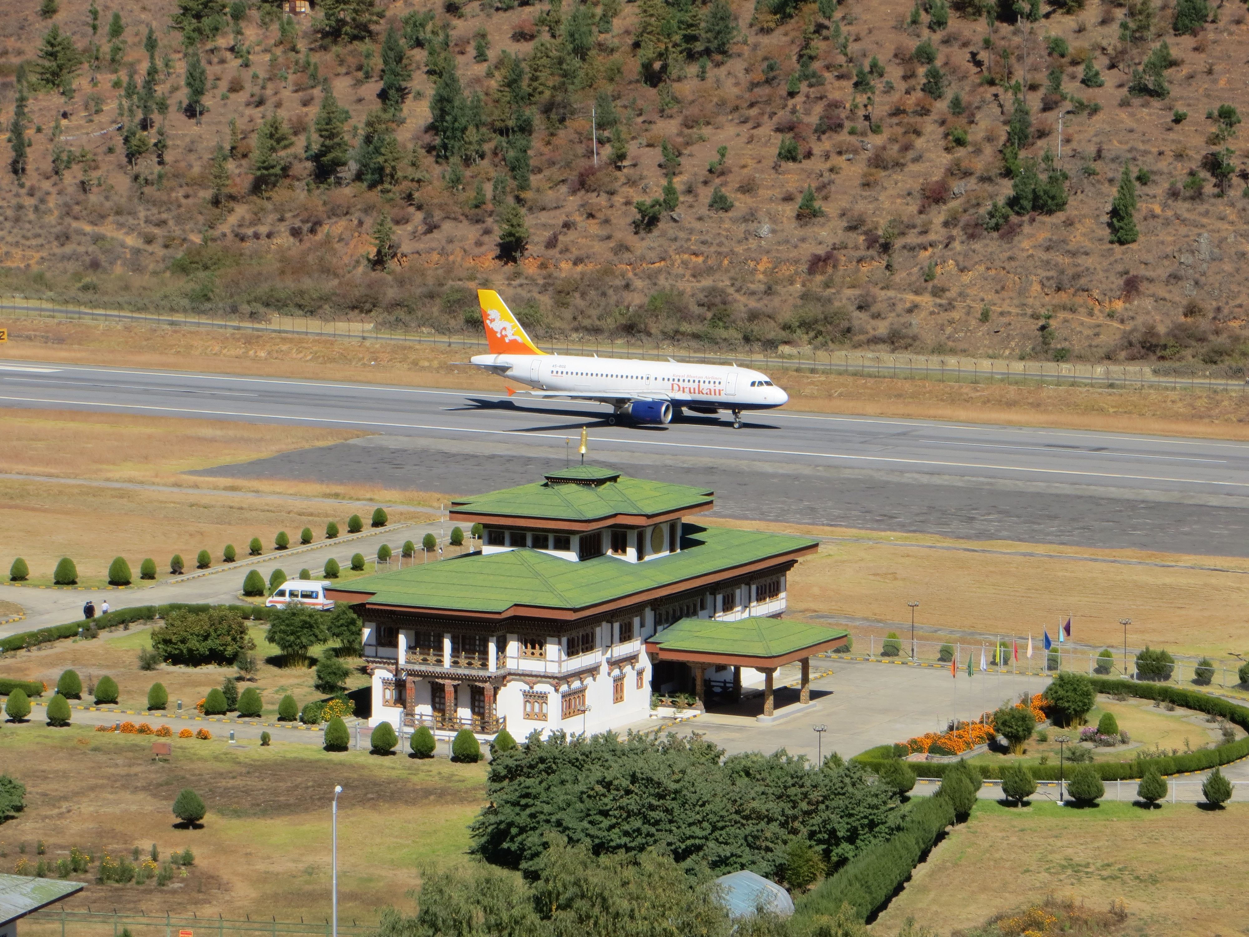 Paro day 1-58